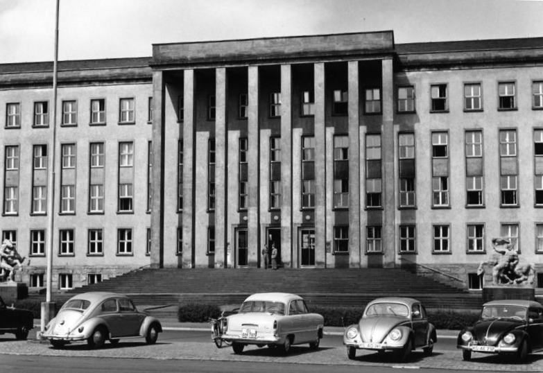 10.-14. Juni 1958 Bundesgrenzschutz Kassel Kommandogebäude